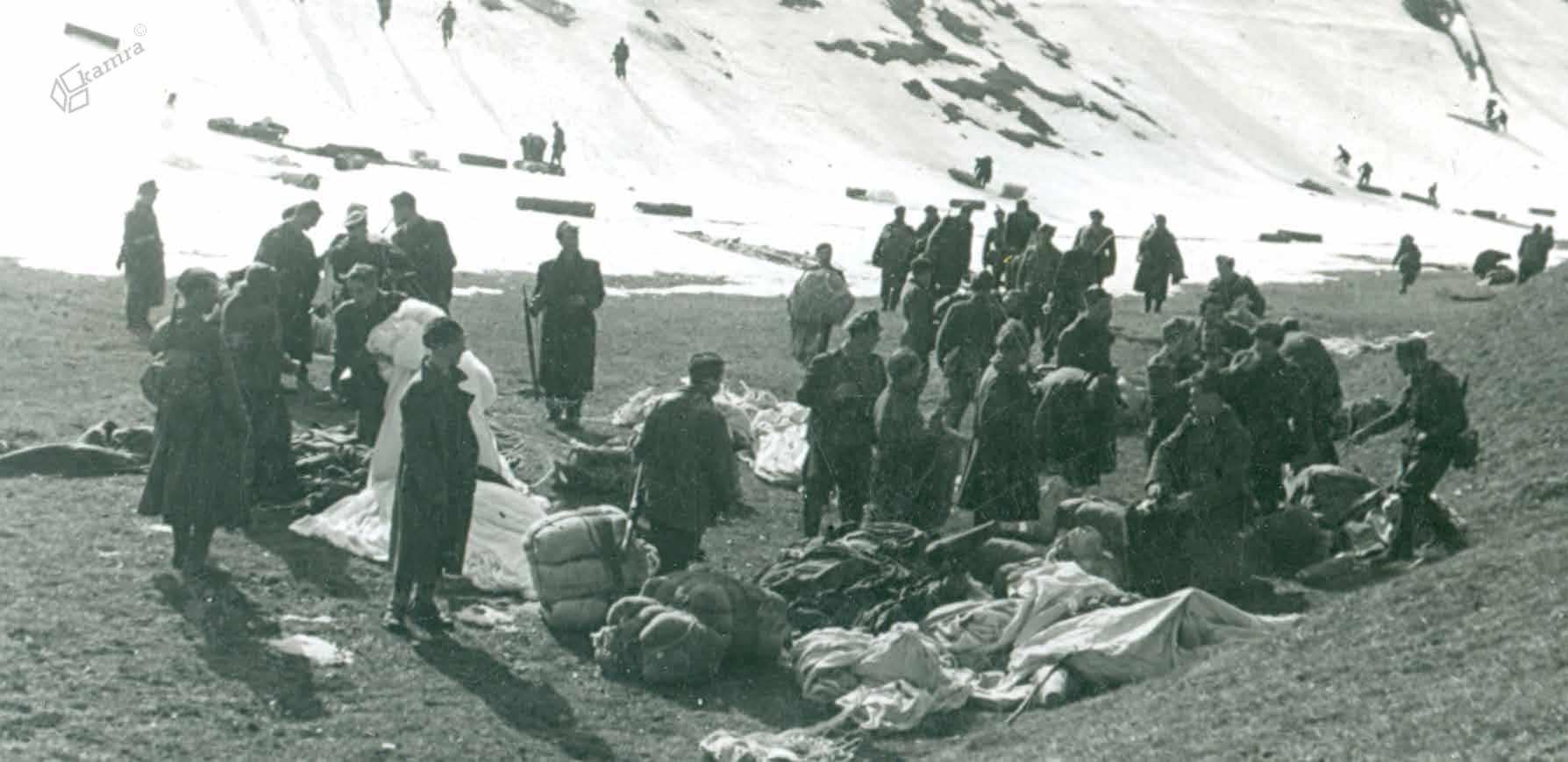 Partizani Vzhodnokoroškega odreda ob odvrženi zavezniški pomoči pod Raduho, 1944.